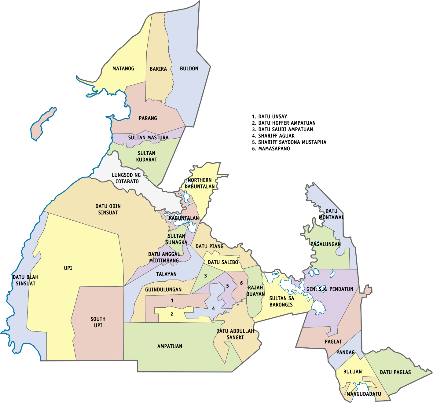 Tagalog: Mapang politikal ng Maguindanao, Pilipinas